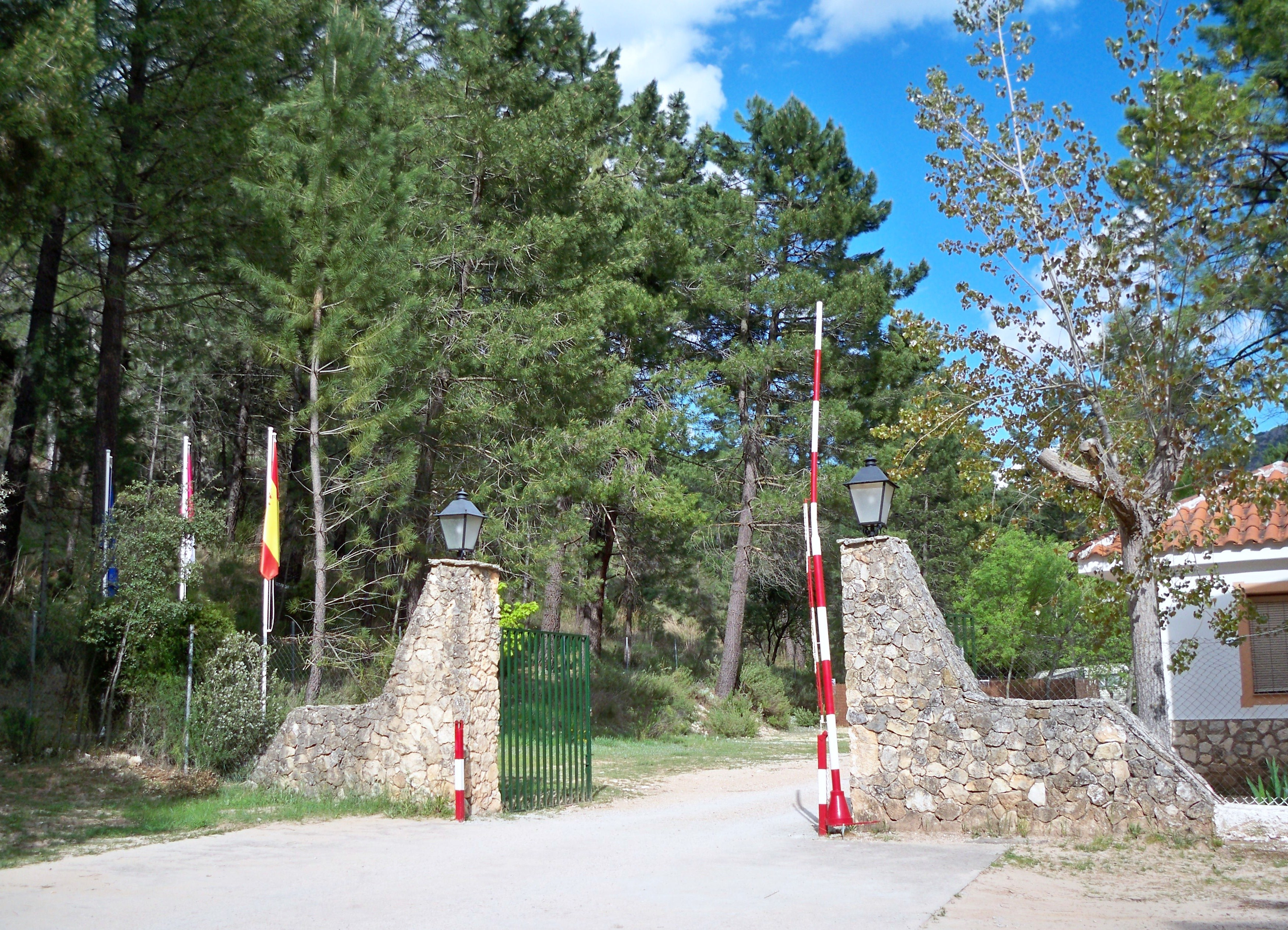 Entrada zona del Campamento de la localidad de Mesones (Molinicos - Albacete)